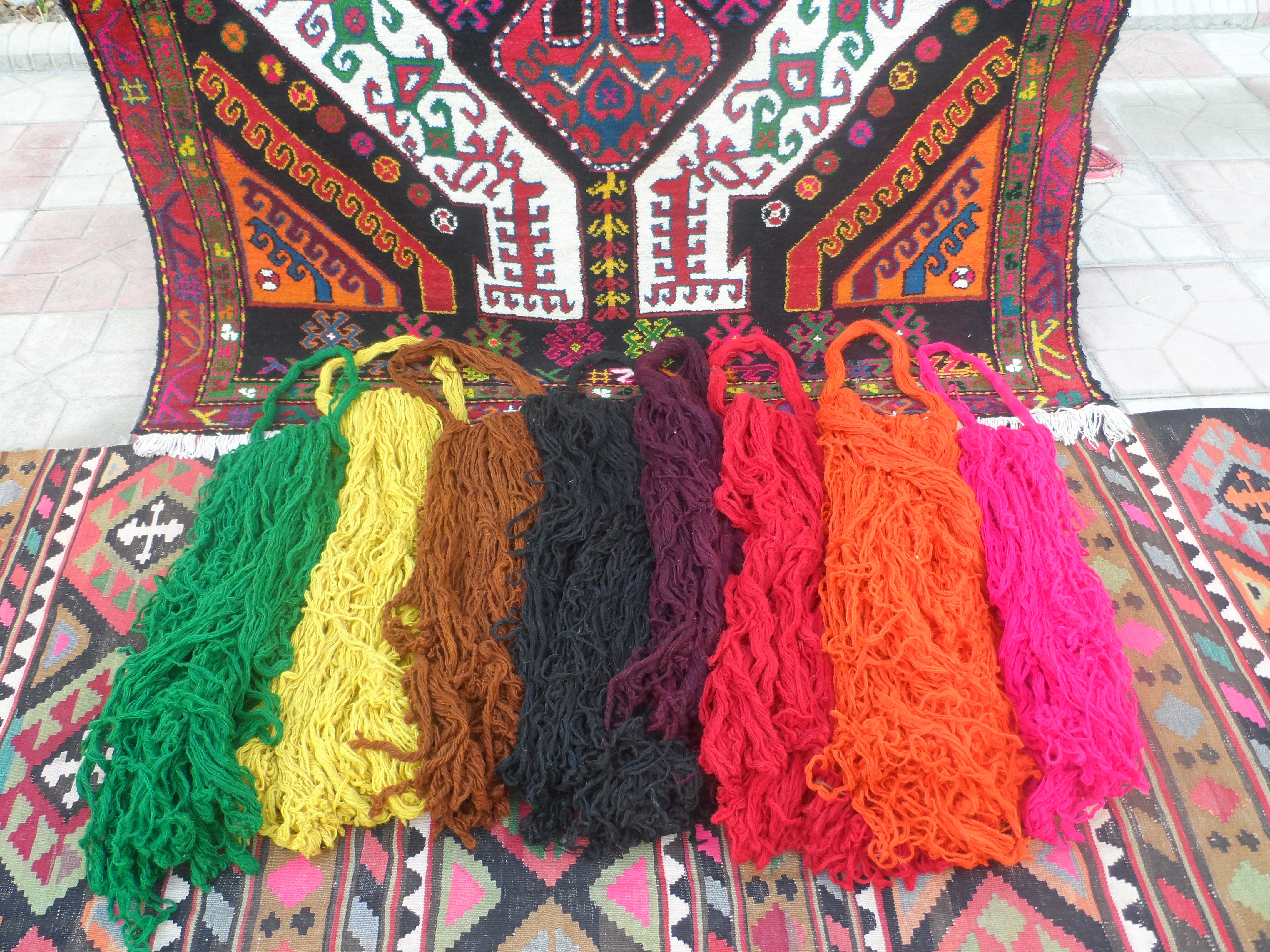 Xalça toxumaq üçün boyanıb hazırlanmış xam yun iplik kələfi.